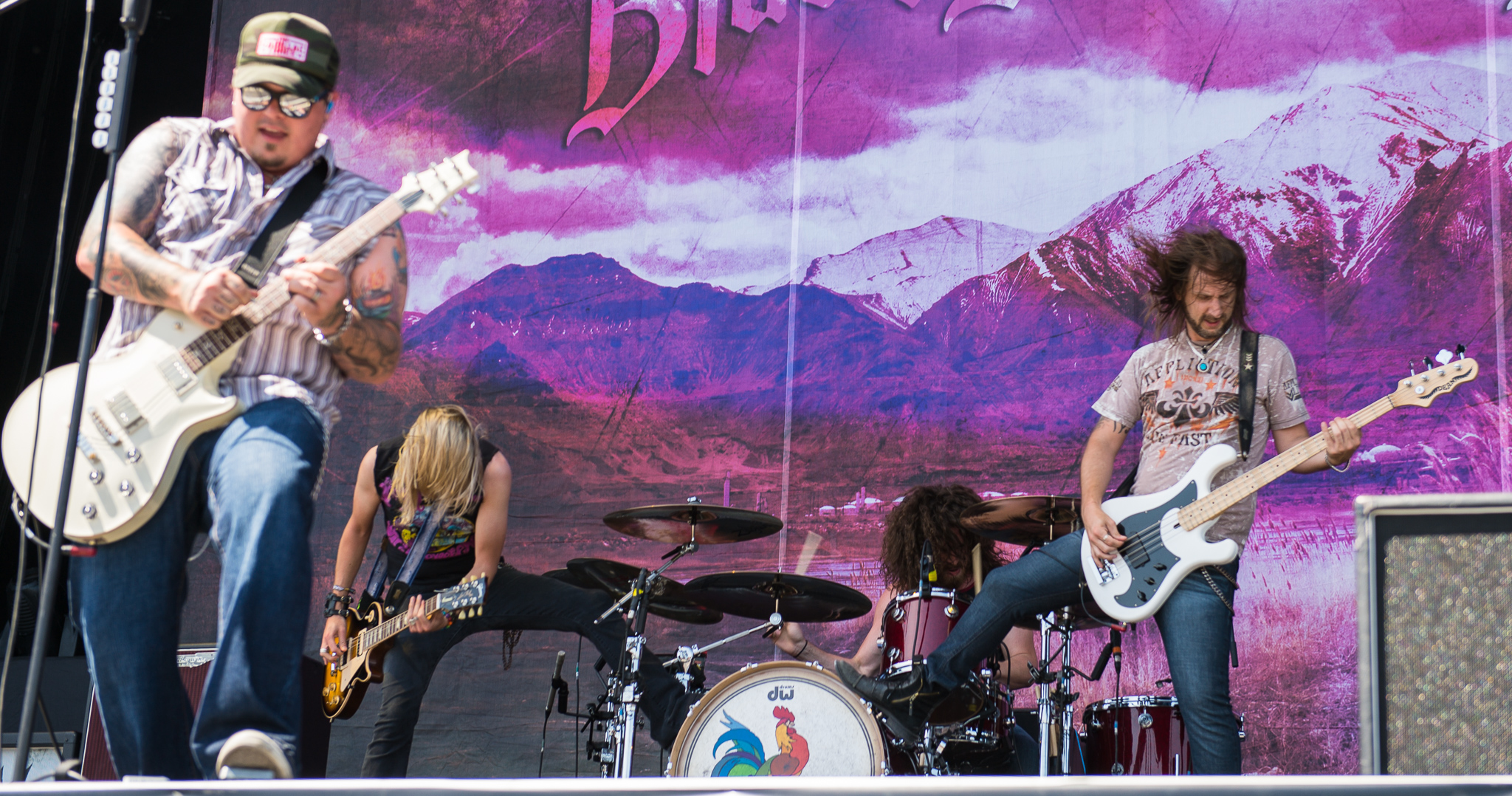 ARGO-Konzerte,Black Stone Cherry,Centerstage,Chris Robertson,John Fred Young,Jon Lawhon,Konzert,Livekonzert,Livemusik,Musik,RiP,Rock im Park 2014